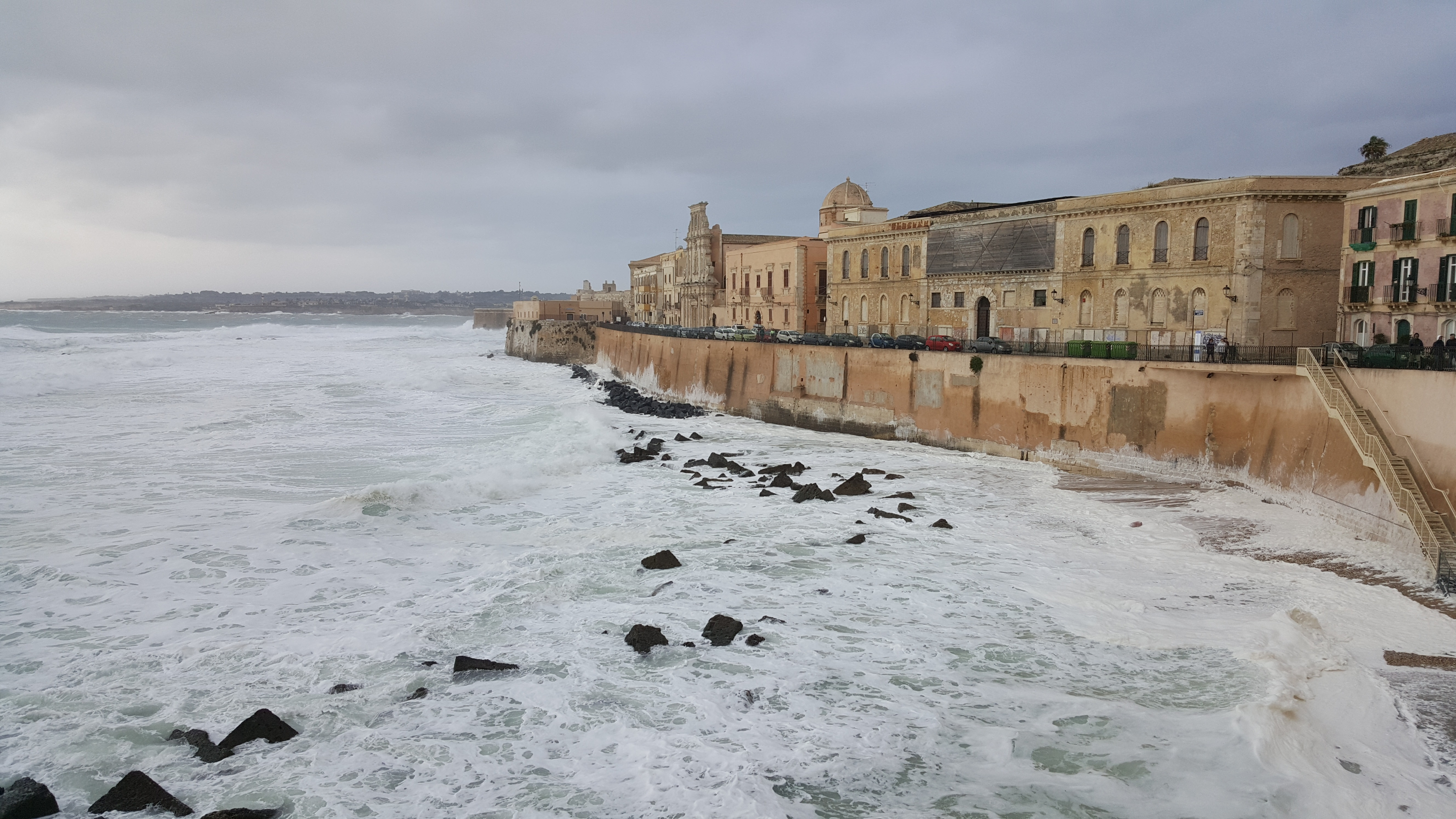 Syracuse, Ortigia foamy sea